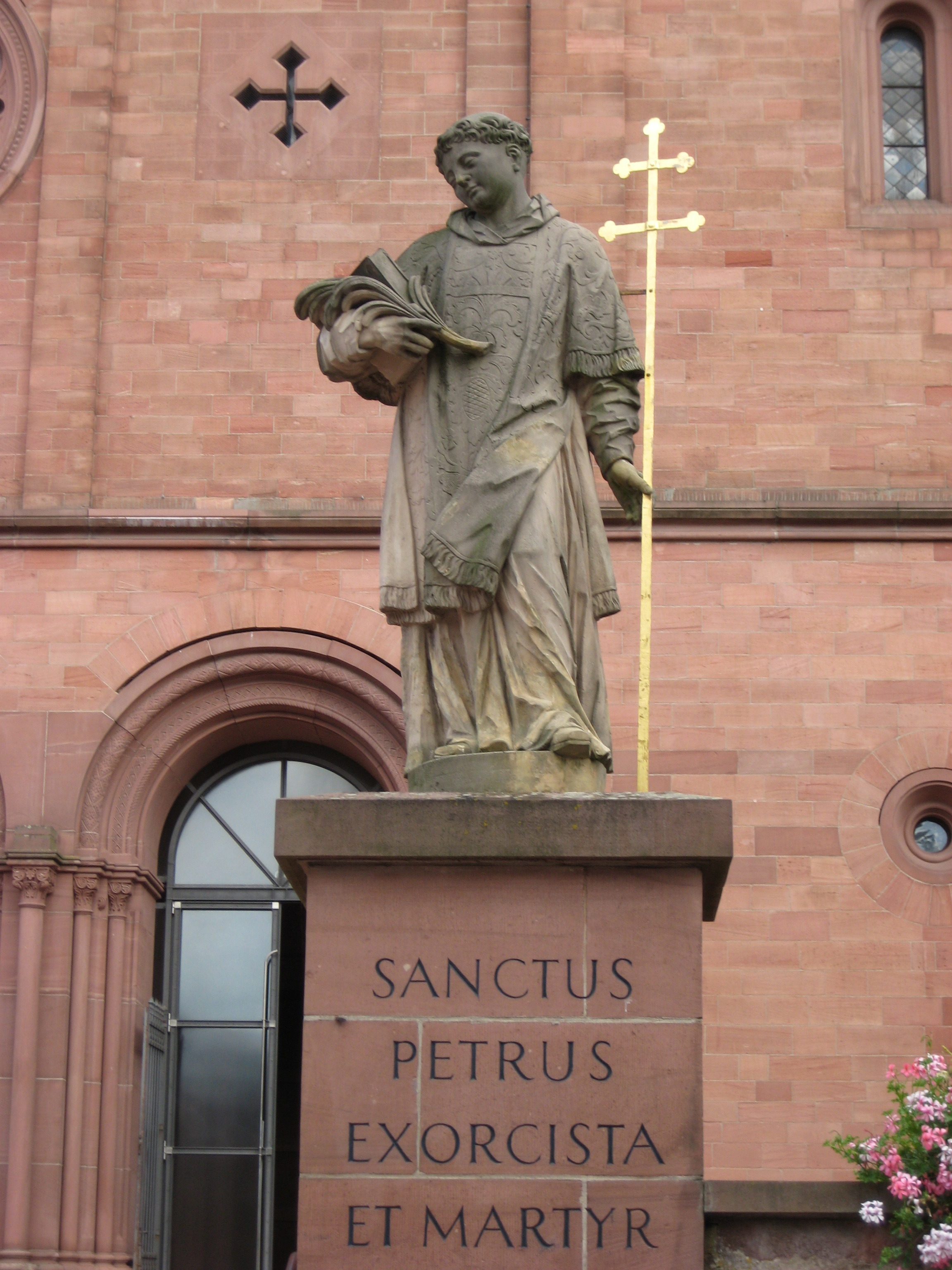 Ikonografische Darstellung Sankt Petrus Martyr